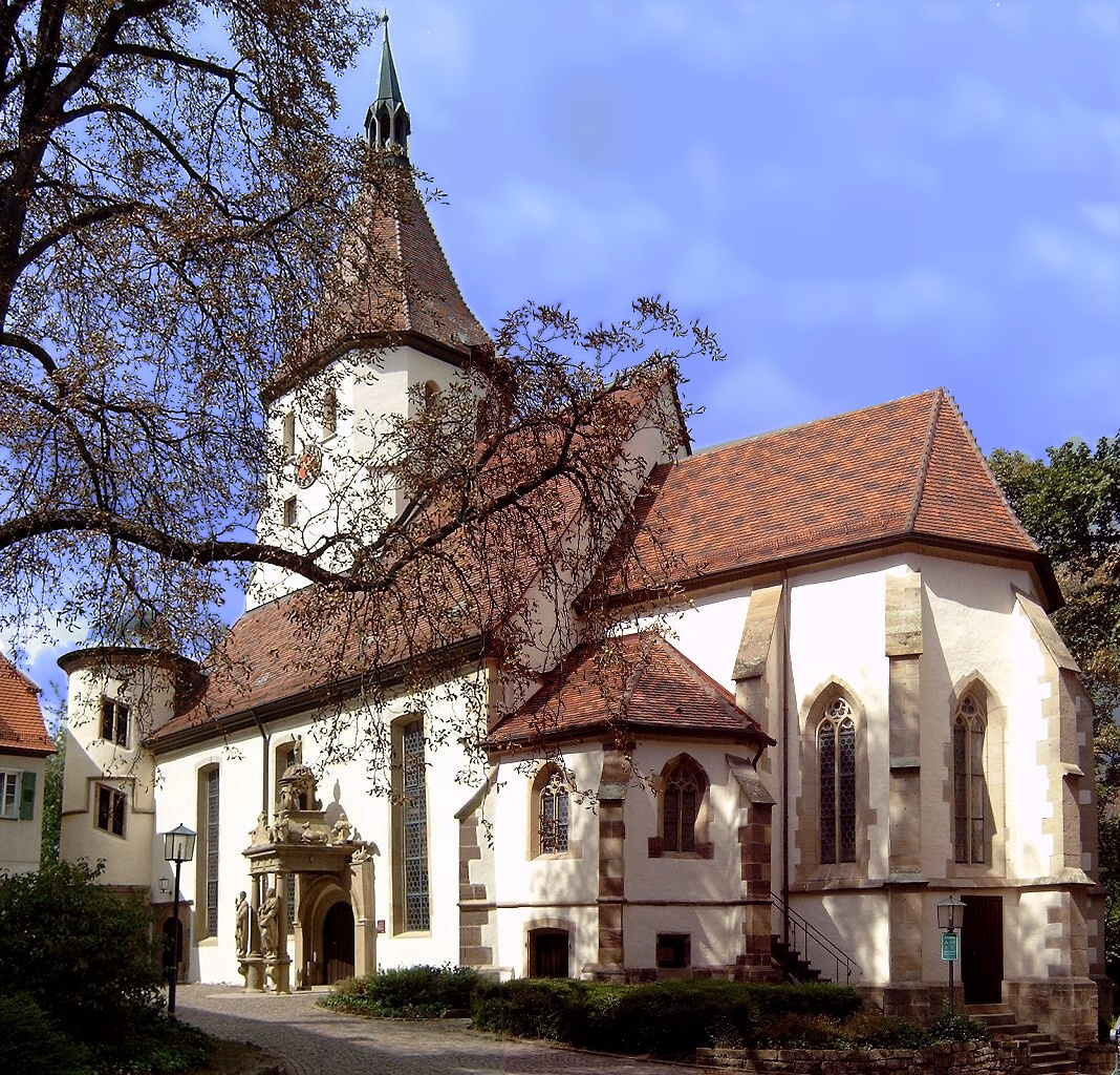 Germany, Hemmingen, Laurentiuskirche, Ansicht Südseite